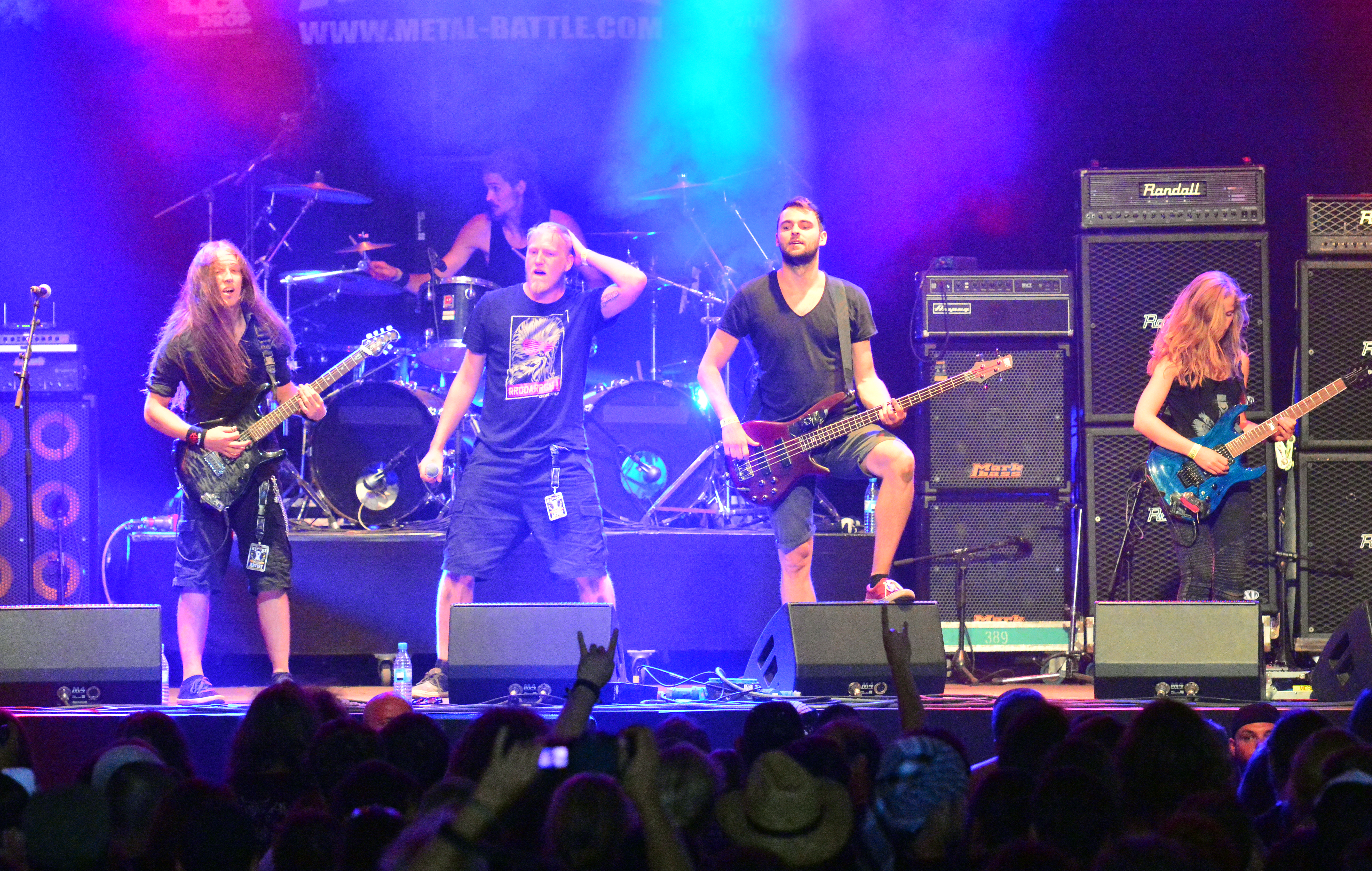 Purest of Pain beim Wacken Open Air 2014